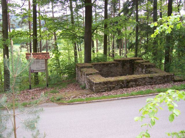 Limeswachturm Wp 14/20 am Raetischen Grenzwall.